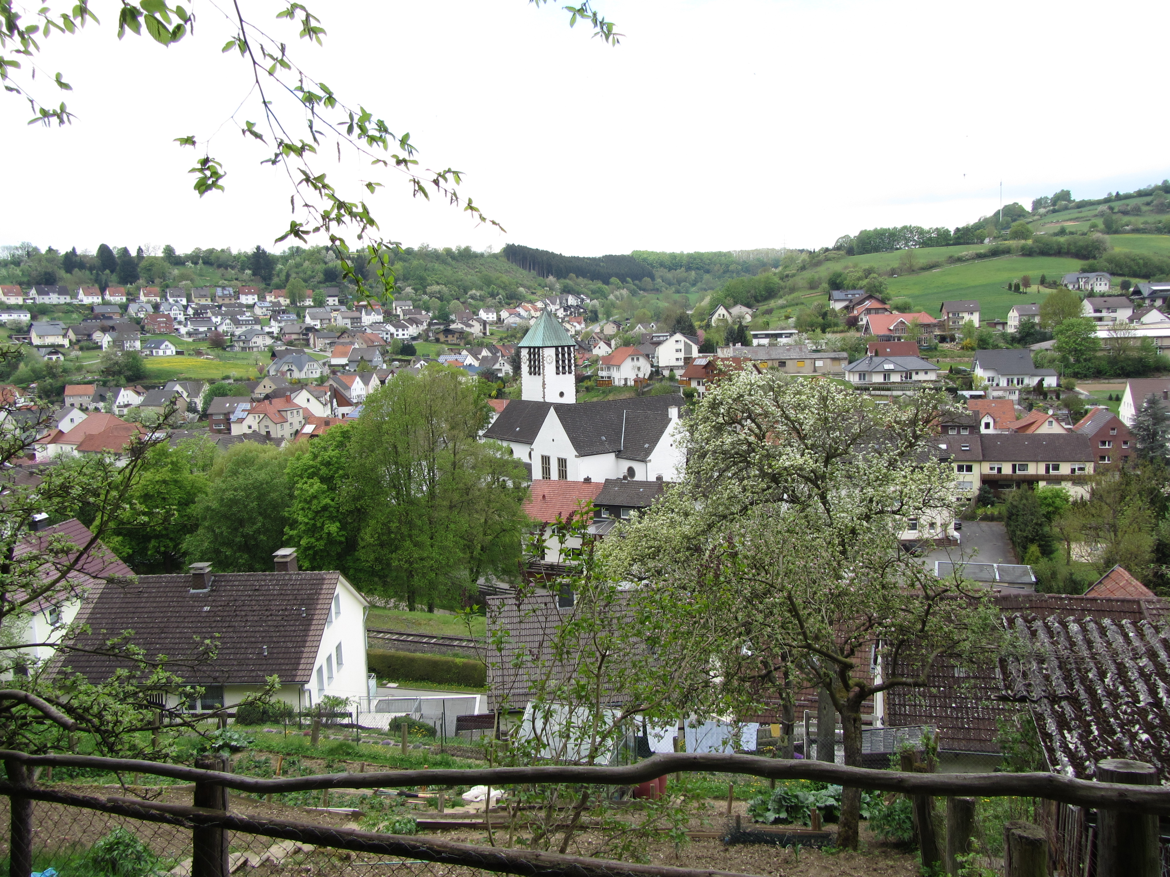 Dalhausen Kirche vom Krähenberg